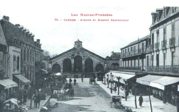 Tarbes (Hautes-Pyrénées, France) - Avenue et Marché Brauhauban.